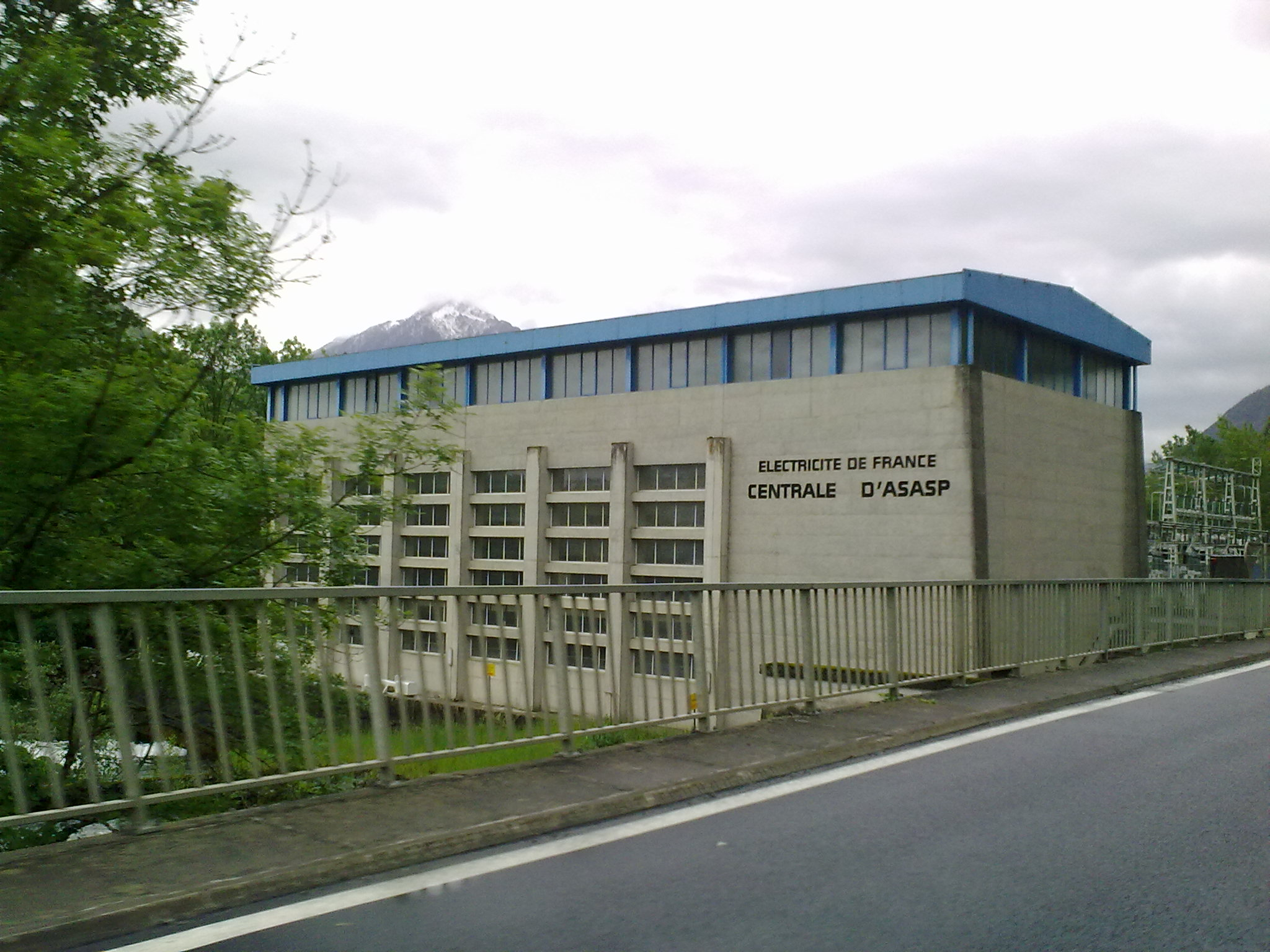 Asasp-Arros, France, quartier Logros, centrale hydro-électrique sur le Lourdios (Gave de Lourdios)